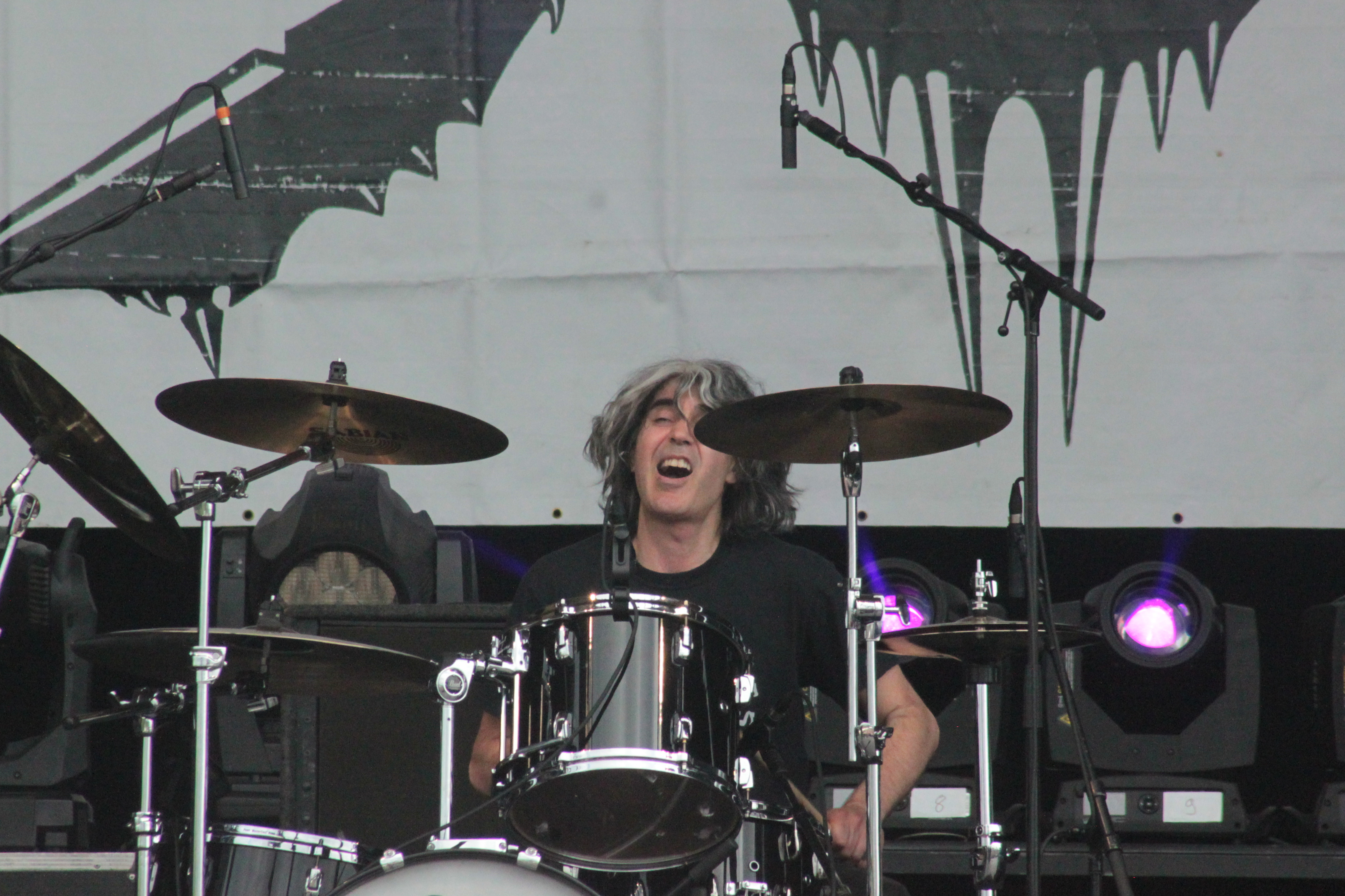 Michel Langevin, Voivod, Hellfest 2013, Fr-44-Clisson.